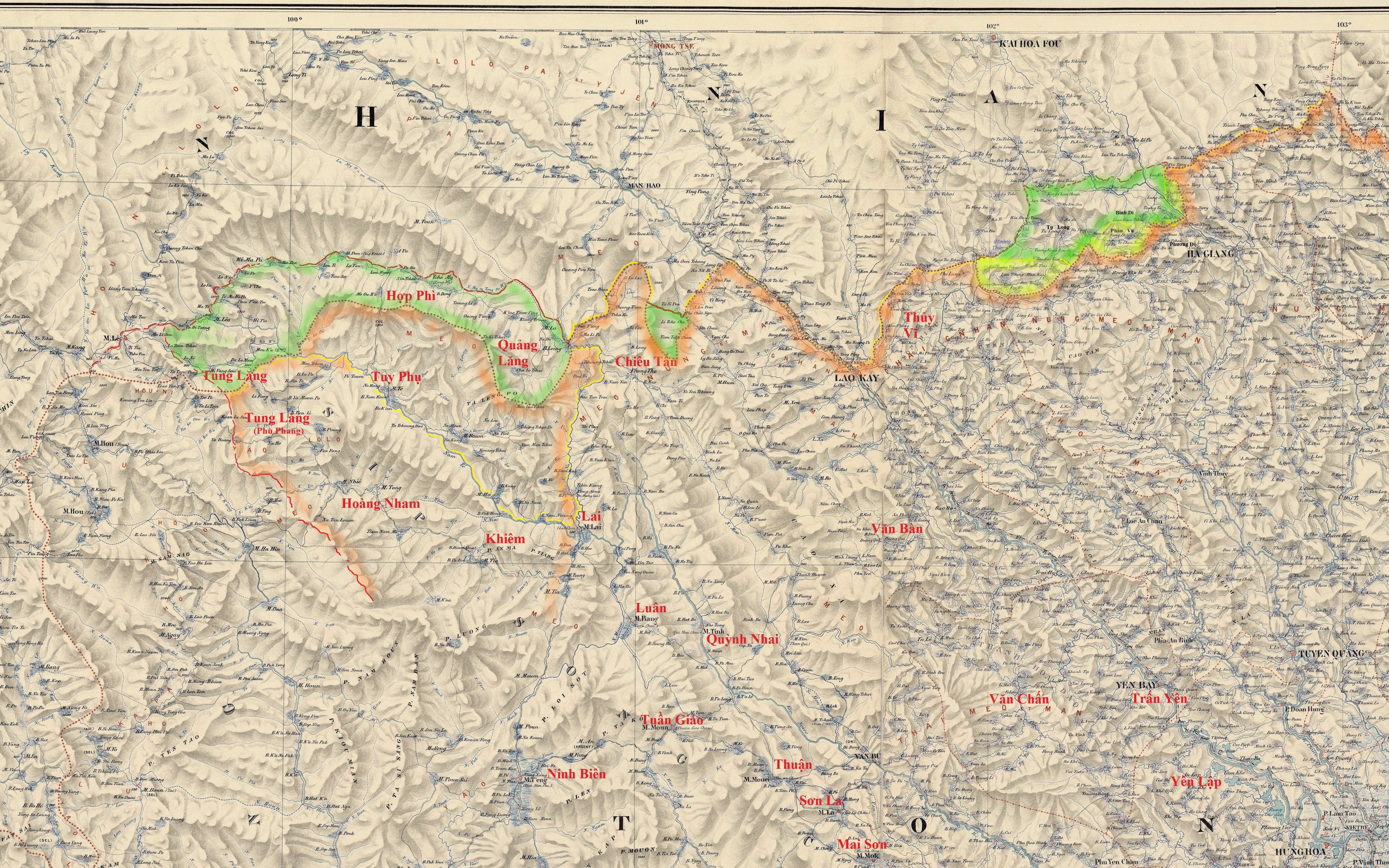 Biên giới Hưng Hóa-Vân Nam thời Lê sơ so với Biên giới Việt Trung năm 1902, và vị trí các địa danh châu huyện thuộc các phủ Quy Hóa, An Tây, Điện Biên của xứ Hưng Hóa tiếp giáp Trung Quốc, gôm (Văn Bàn, Thủy Vĩ, Chiêu Tấn, Quảng Lăng, Hợp Phì, Tuy Phụ, Hoàng Nham, Lễ Tuyền, Khiêm, Lai, Luân, Thuận, Tuần Giáo, Ninh Biên, Quỳnh Nhai).